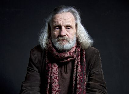 Janusz Opryński